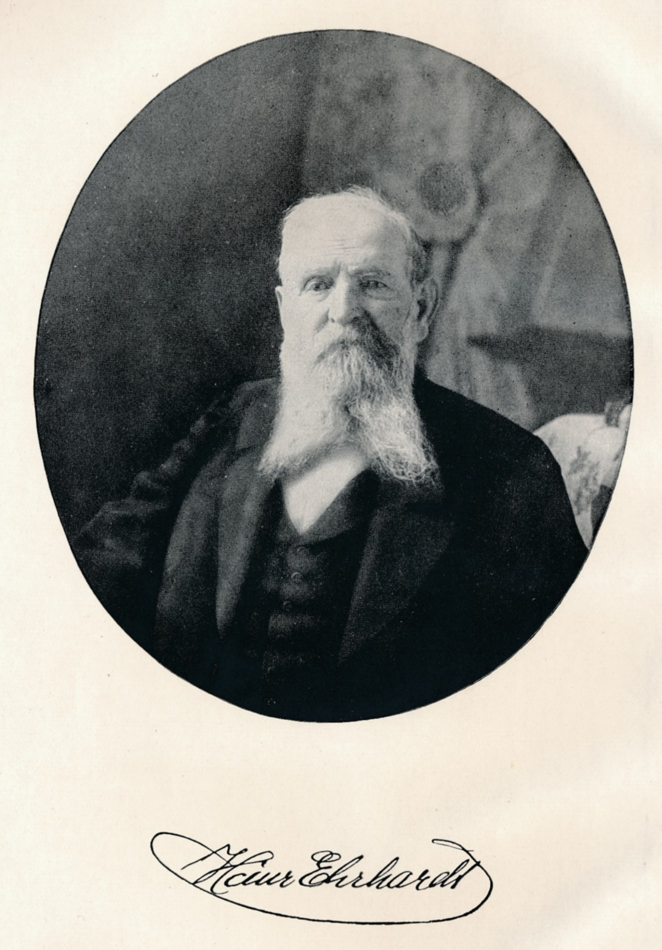 Frontispice aus dem Buch Hammerschläge des deutschen Ingenieurs, Erfinders und Buchautor Heinrich Erhardt (1840-1928). 2. Auflage. Verlag K.F.Koehler, Leipzig 1923